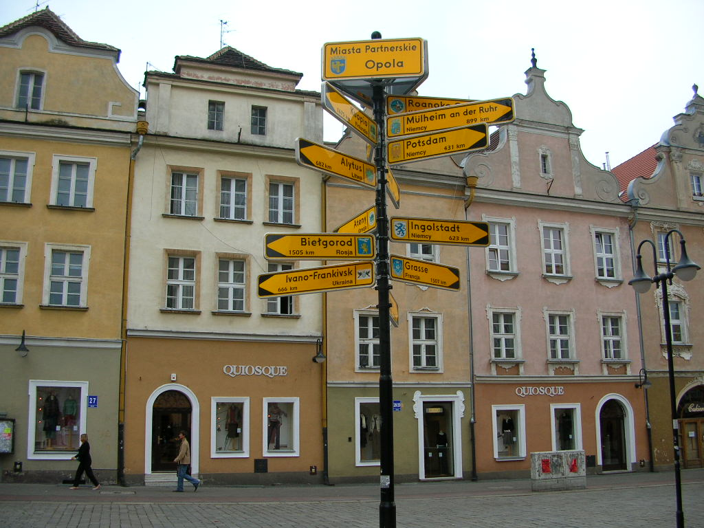 Opole - tabliczka z nazwami partnerskich miast Opola Autor - Bartek Wawraszko ( Bast )